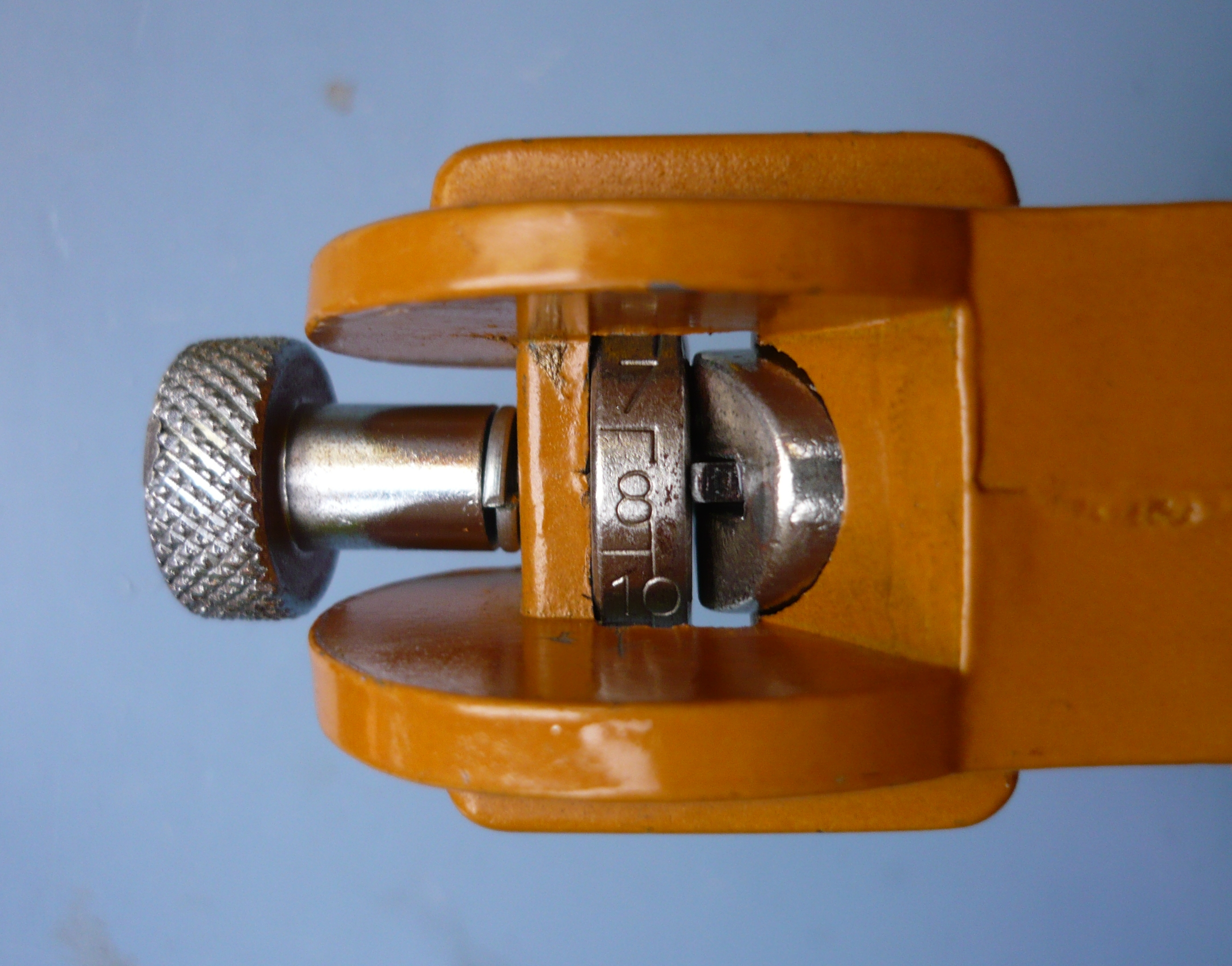 Zaagzettang in gesloten toestand, detail met o.a. aambeeld